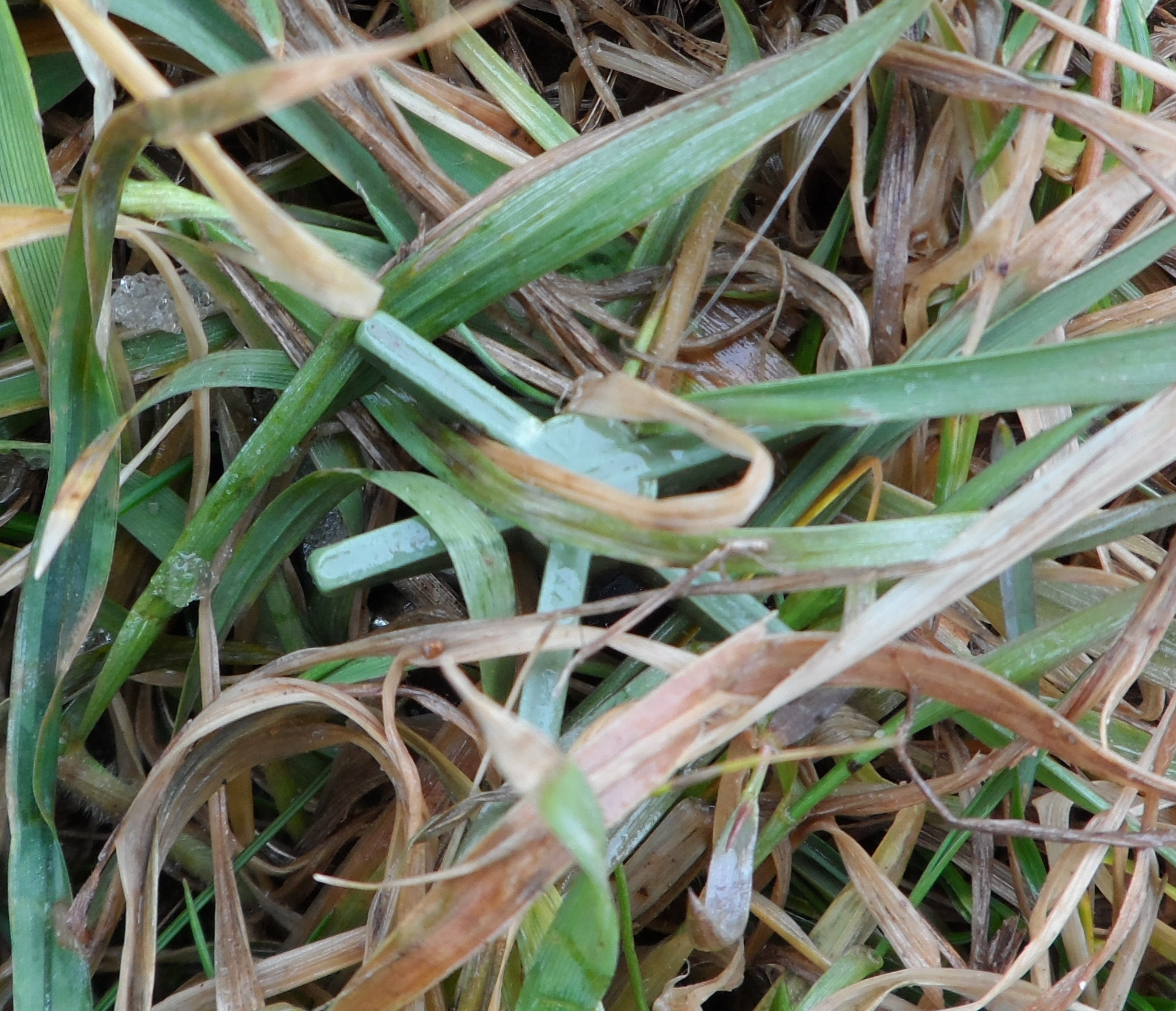 Druckstück der Antipersonenmine PMA-2